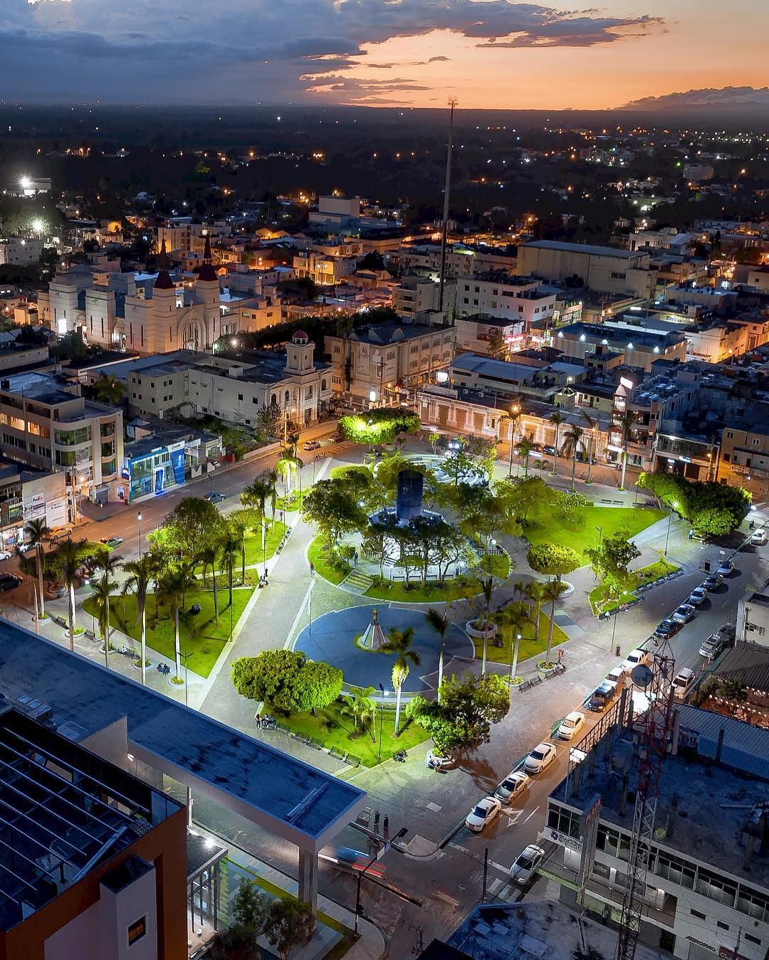 parque duarte san francisco de macoris